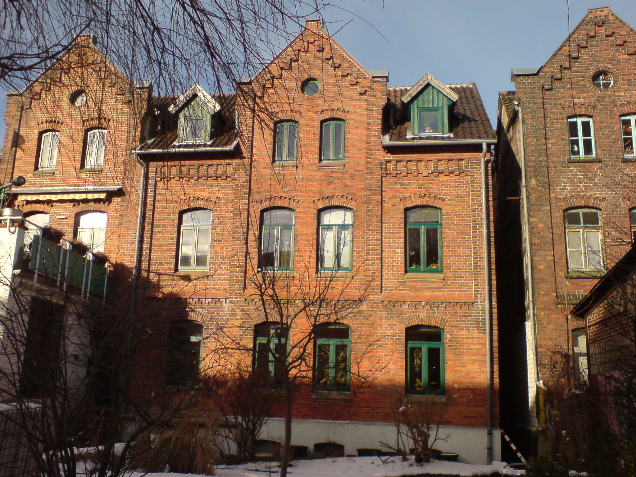 Am Puttenser Felde 8, rechts daneben Nr. 7. In Leo Brawand's Buch "Die Leute vom Damme" schreibt er, er habe in Nr. 9, Hinterhaus, Dachkammer gewohnt.